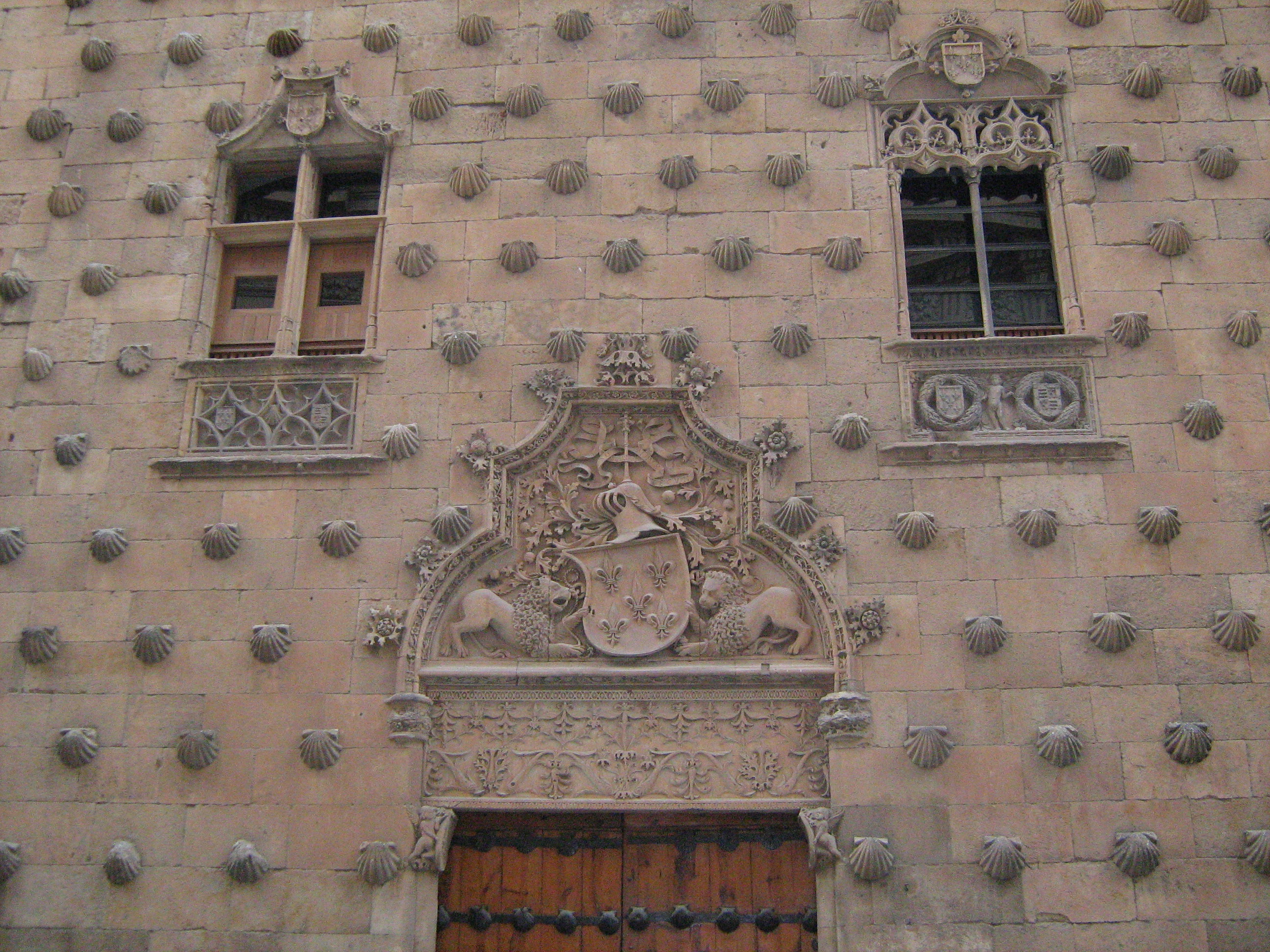 Casa das Conchas (pormenor da fachada).